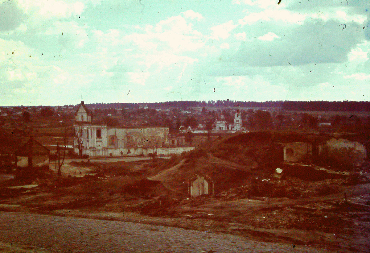 Беларуская (тарашкевіца): Ворша (Vorša), Зааршыньне (Zaaršyńnie). Касьцёл Сьвятога Язэпа і кляштар дамініканаў